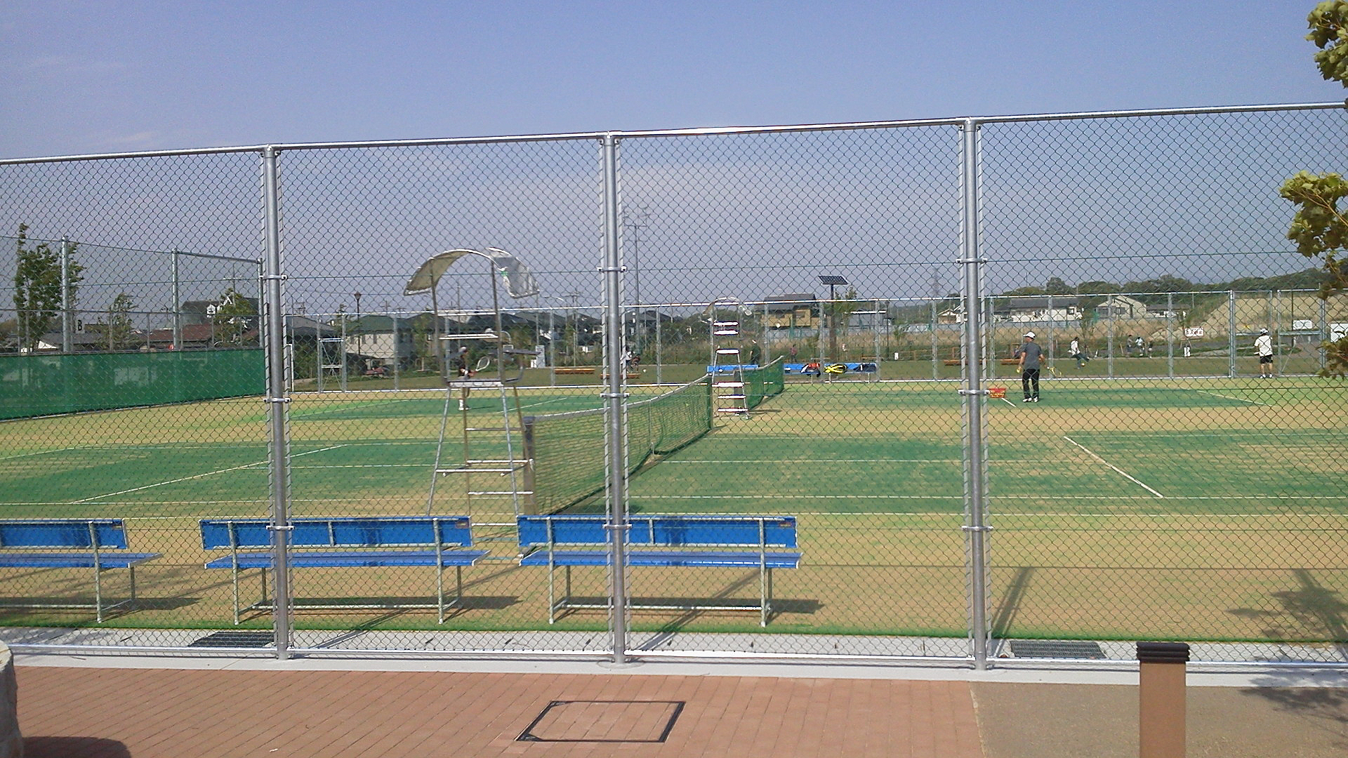 投稿者自身が大阪府和泉市内の児童公園のひとつである『くすのき公園』を撮影。 （テニスコート）